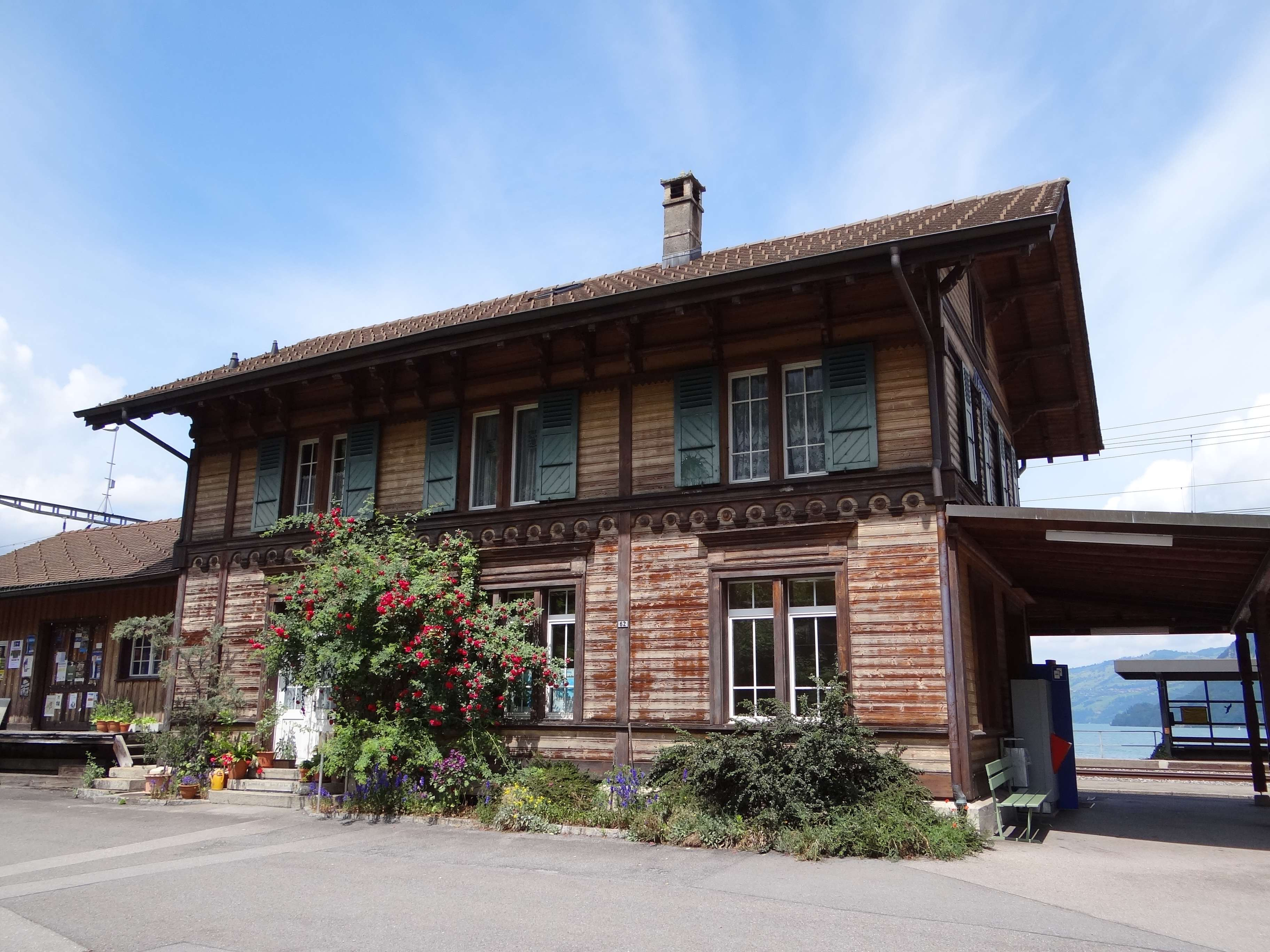 Leissigen, Switzerland